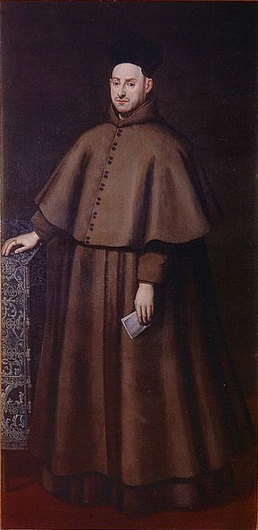 Retrato del eclesiástico español Pedro González de Mendoza (1570-1639), que llegó a ser arzobispo de Granada y de Zaragoza y obispo de Sigüenza. El retrato se conserva en el museo de la colegiata de Pastrana, provincia de Guadalajara (España).